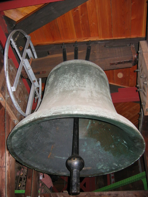 Description – Angelusglocke. Größte Glocke des Dachreiters, Kölner Dom. Source – own work Date – Sommer 2006 Author – Andreasdziewior